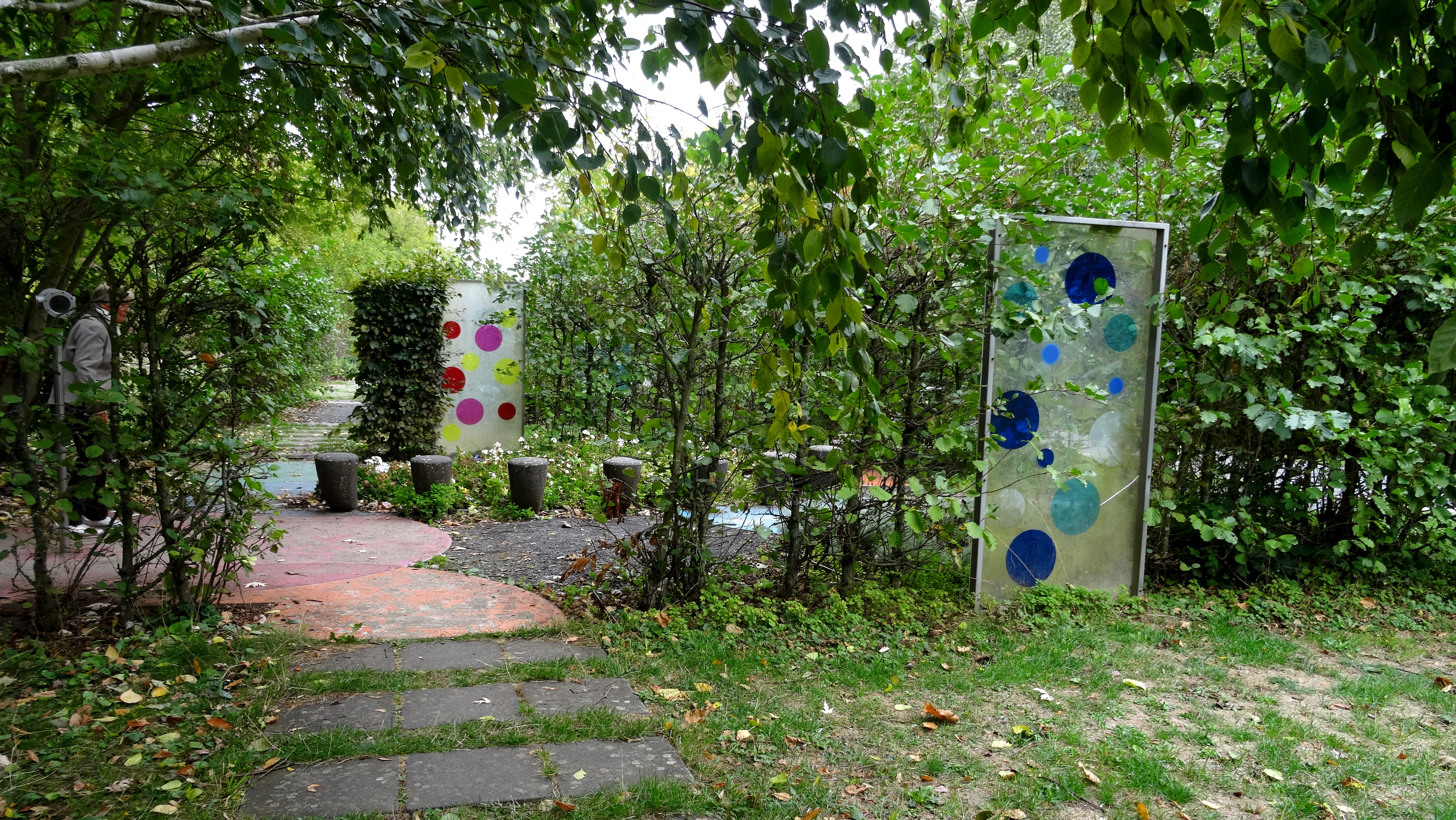 Teil der ehemaligen Landes Gartenschau